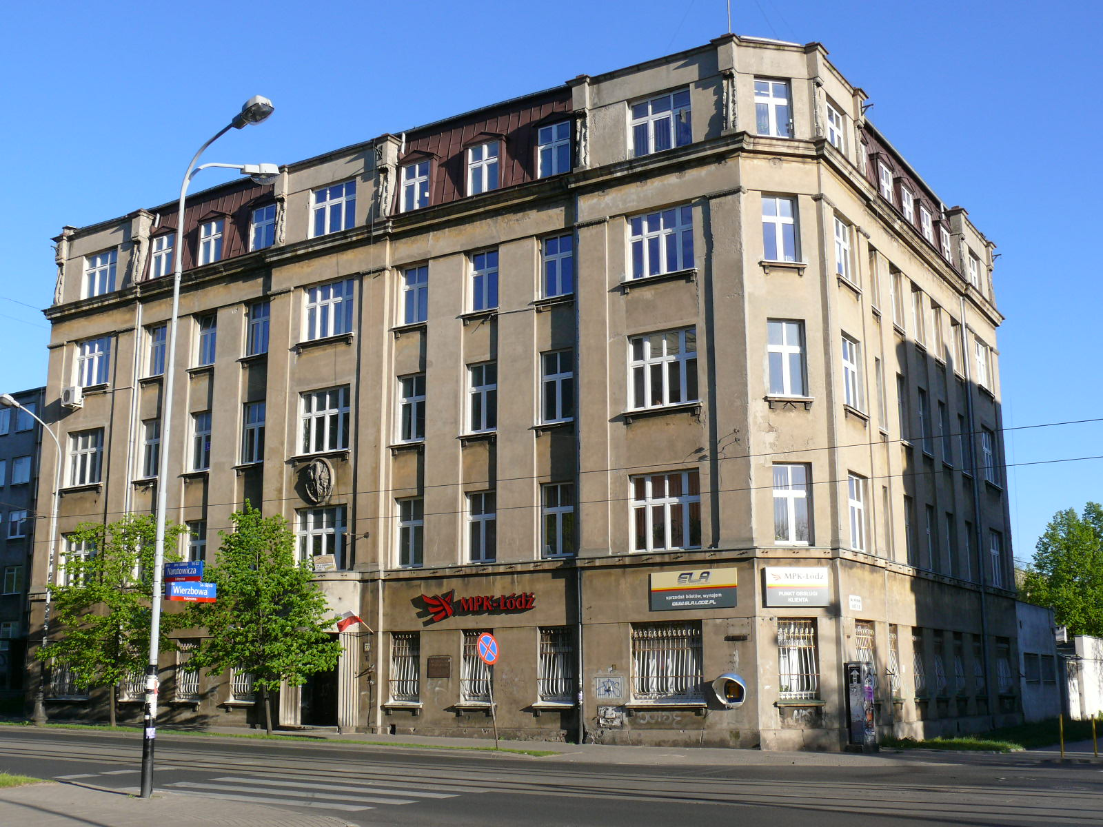 Kamienica przy ul. Narutowicza 77 w Łodzi